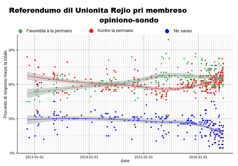 Ido: Statistiki pri la referendumo pri Brekiro (Brexit).